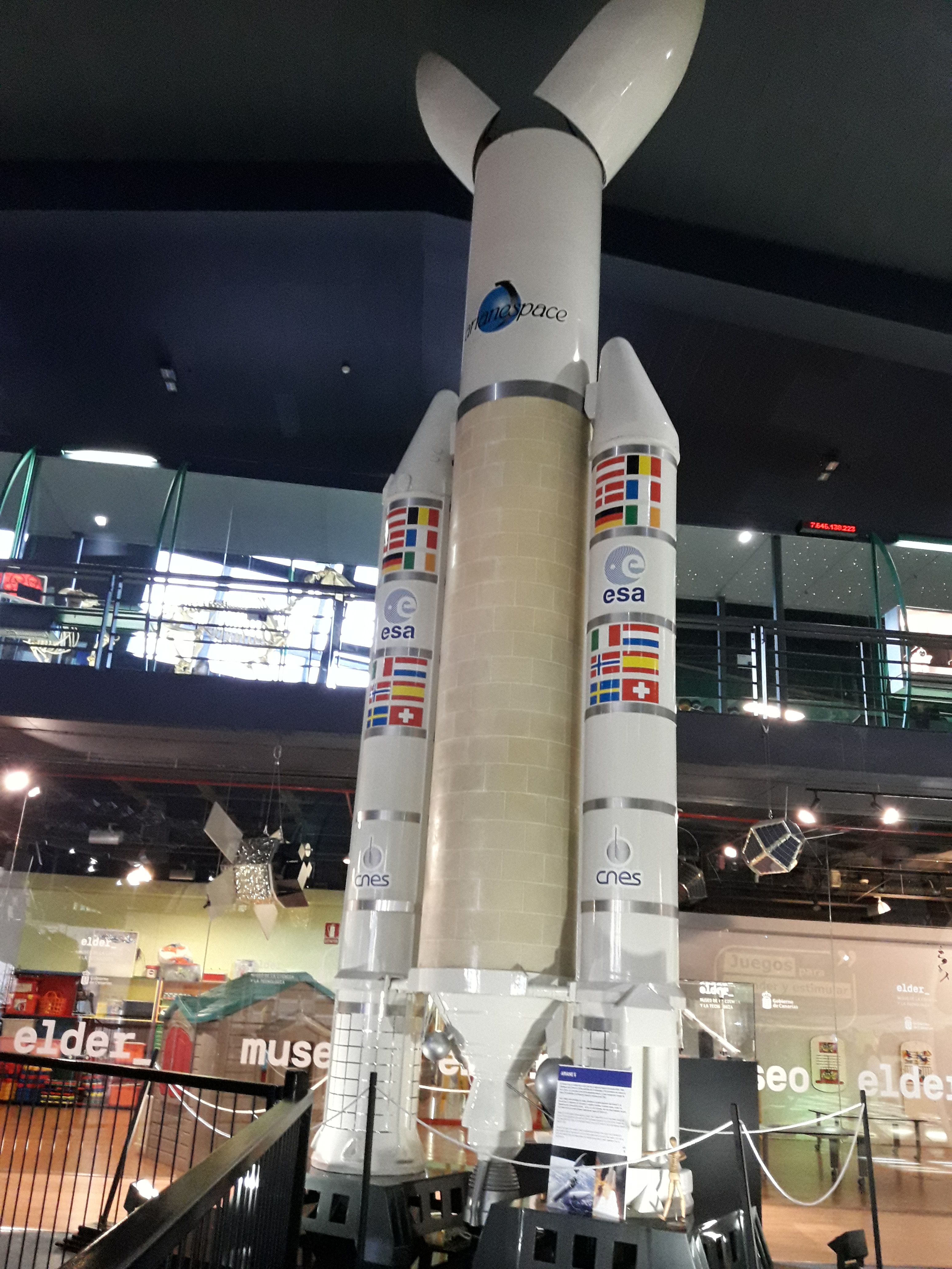 Maqueta del cohete Ariane 5 en el museo Elder de Las Palmas de Gran Canaria